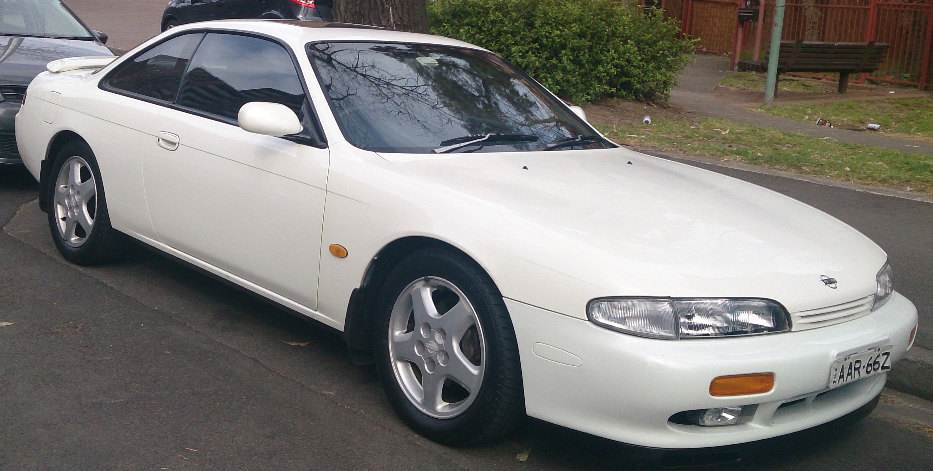 Nissan 200SX